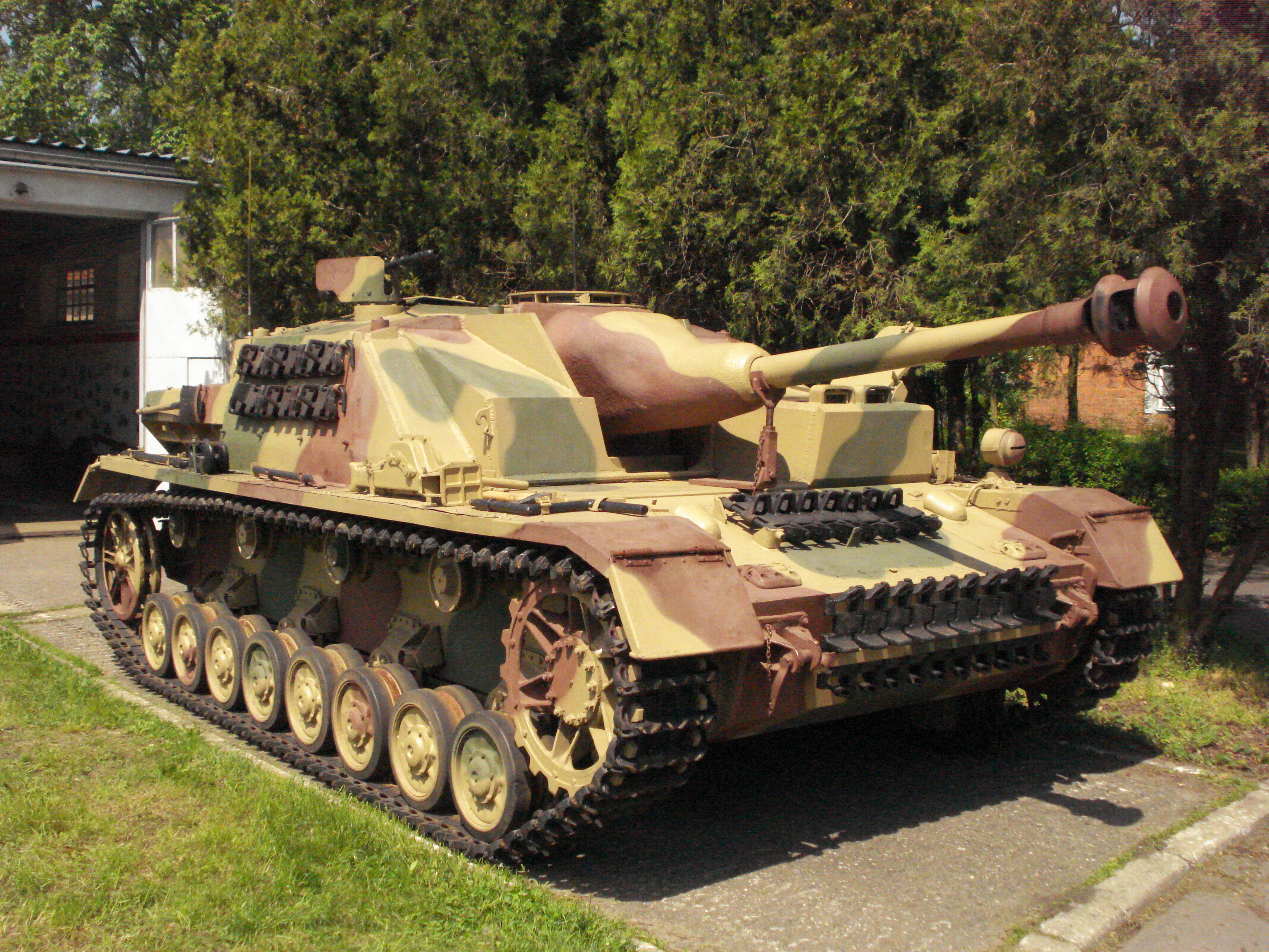 działo Sturmgeschutz IV ze zbiorów Muzeum Broni Pancernej w Poznaniu